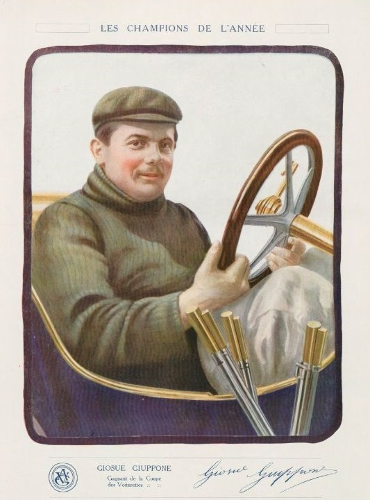 Giosuè Giuppone Champion de l'année 1909 (La Vie au Grand Air) - La Vie au Grand Air du 18 décembre 1909